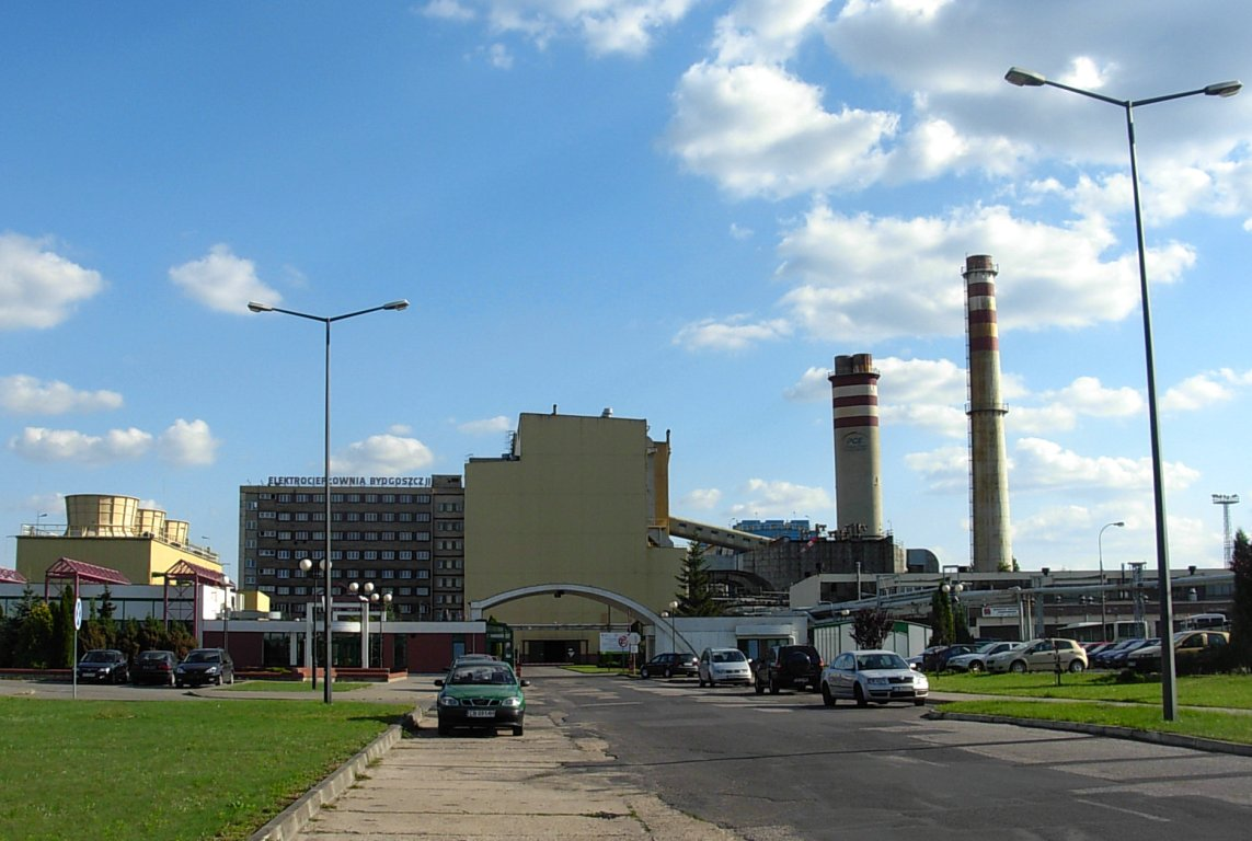 Elektrociepłownia Bydgoszcz II